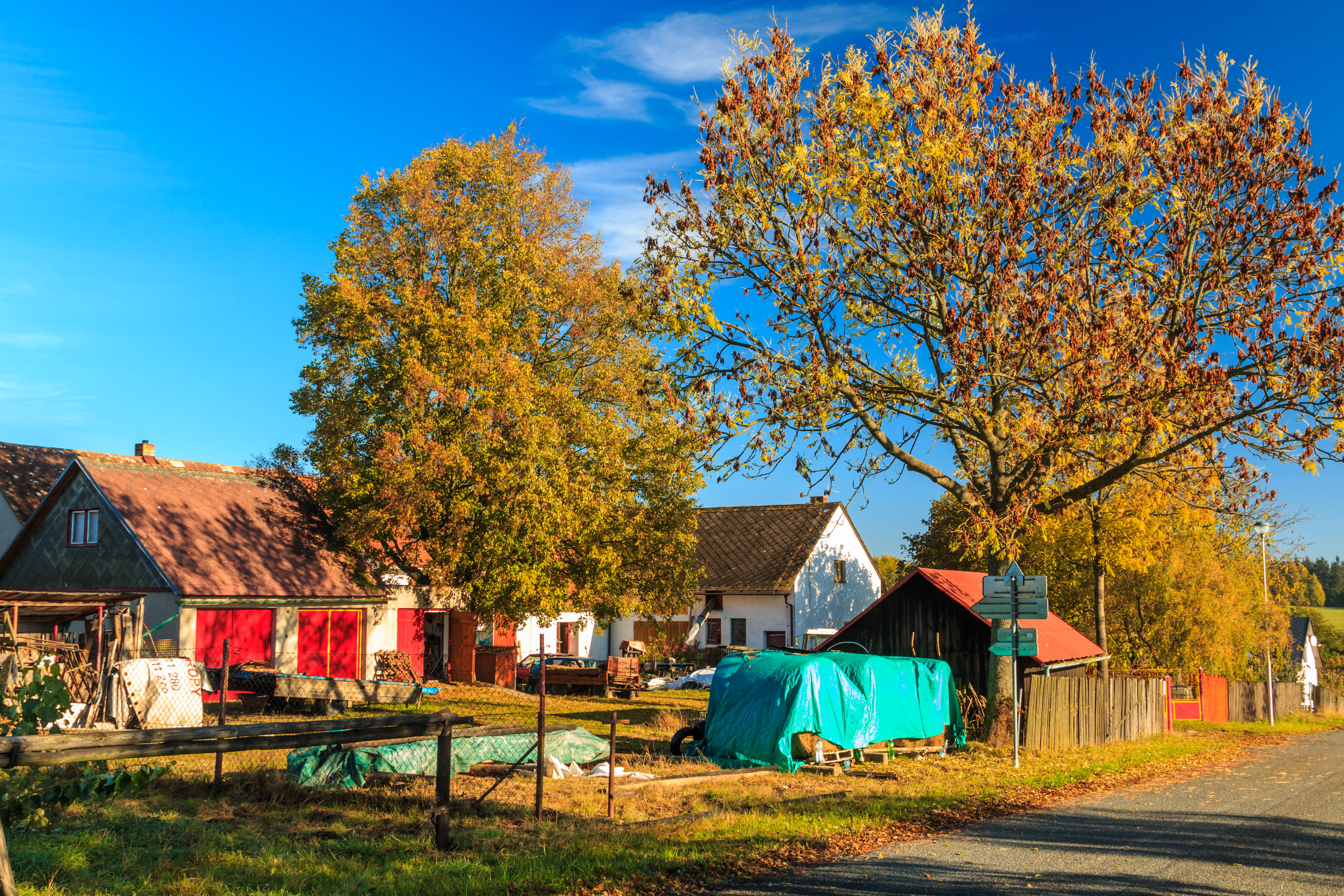 Křemenice čp. 3